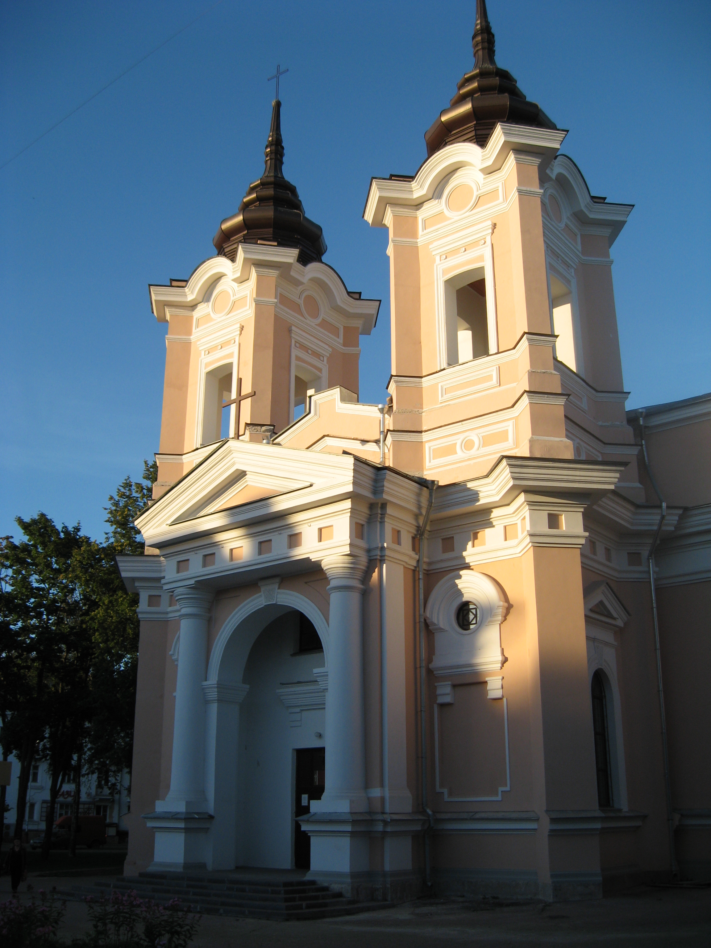 Католический костёл на Большой Санкт-Петербургской улице.